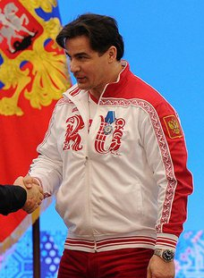 Орденом Почёта награждён двукратный серебряный призёр Олимпийских игр в санном спорте Альберт Демченко.